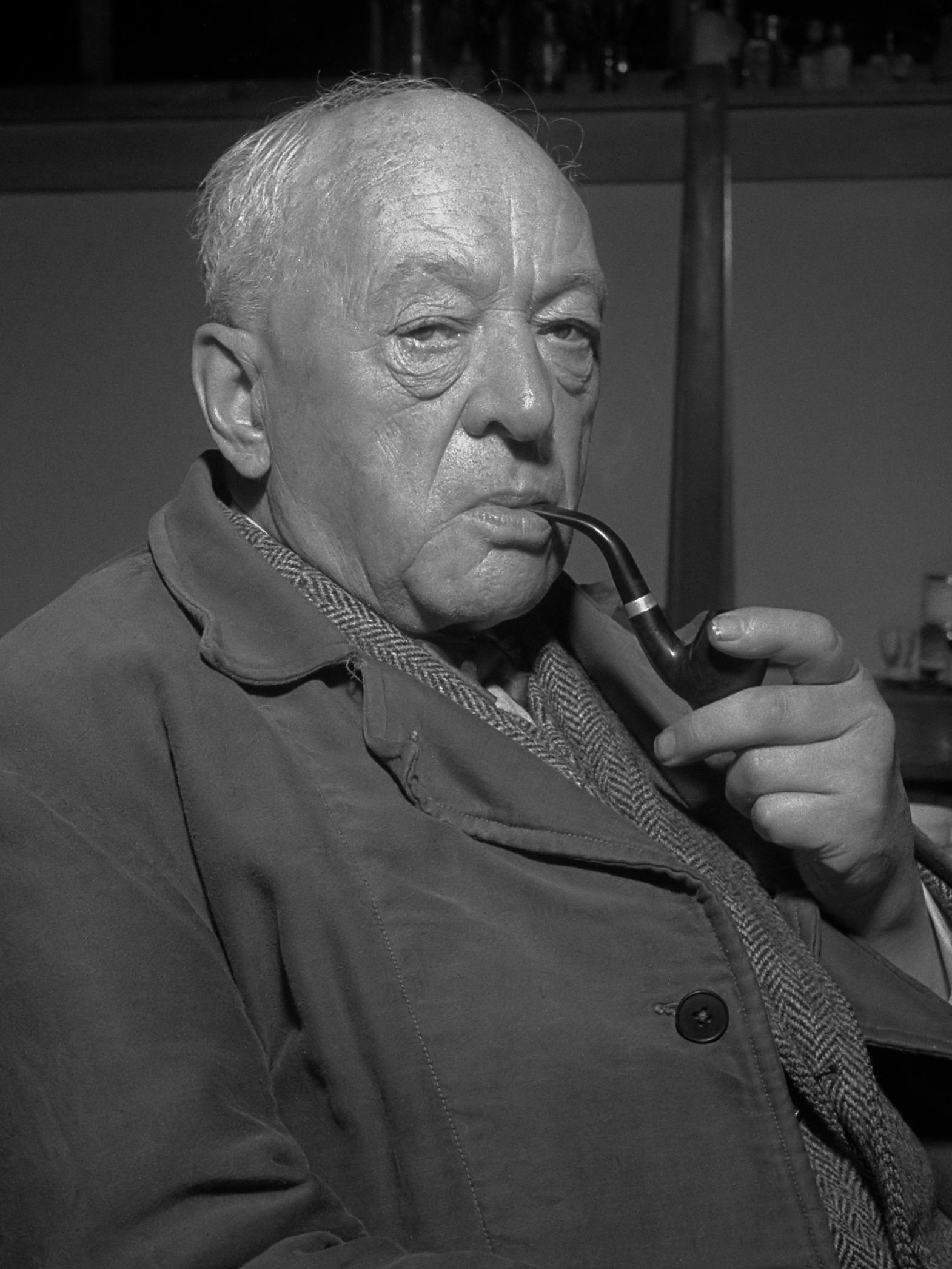 Opnamen schilder Bart van der Leck . Onlangs 80 jaar geworden. Een van de oprichters van de Stijlgroep 3 december 1956